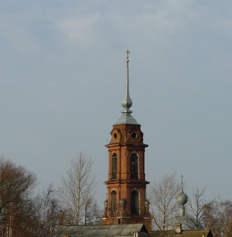 Церковь Богоявления расположена на въезде в с. Новый Некоуз, основана около 1870г.